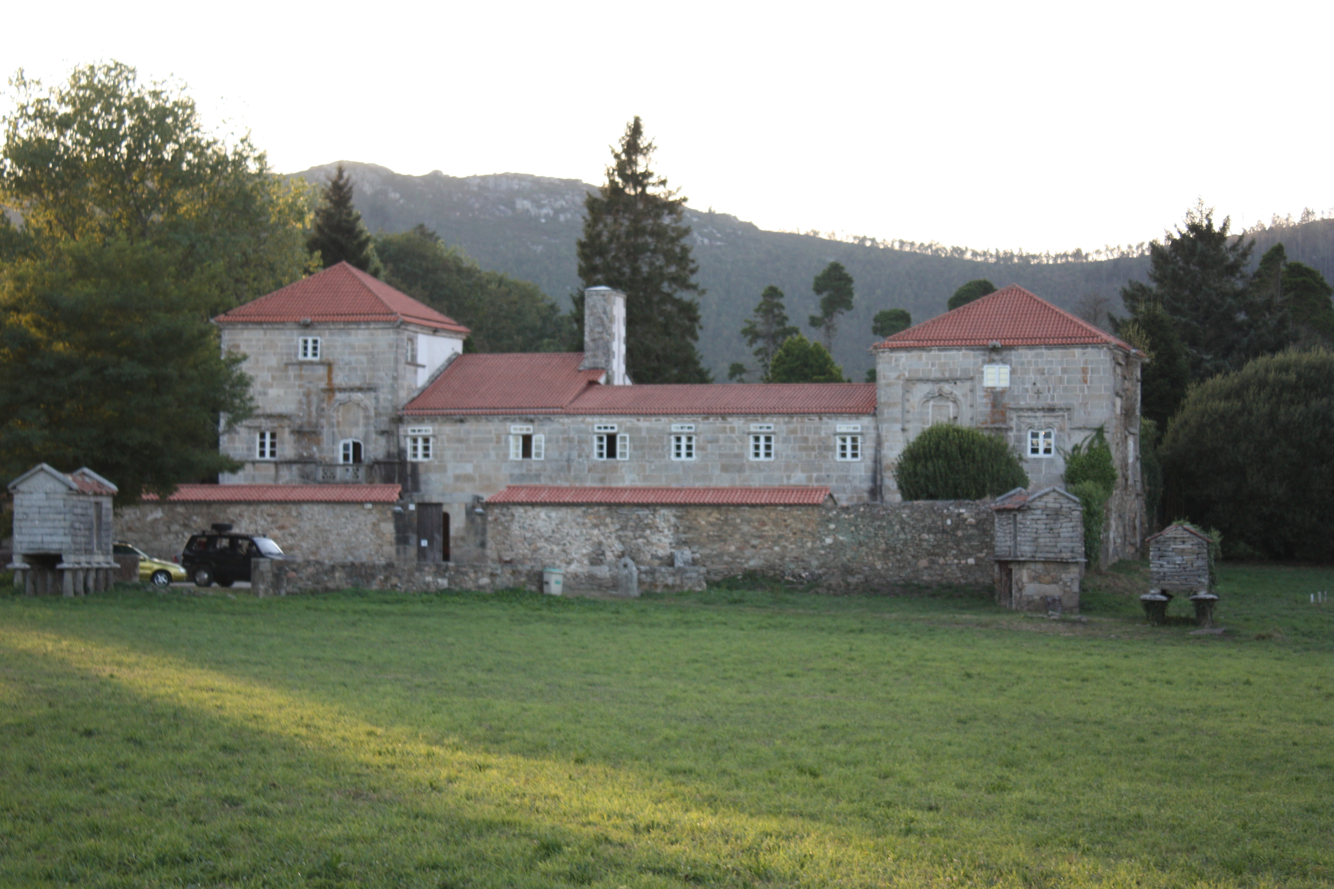 As Torres do Allo e os seus horreos Categoría:Imaxes do Allo Allo Categoría:Imaxes de Bens de Interese Cultural de Galicia